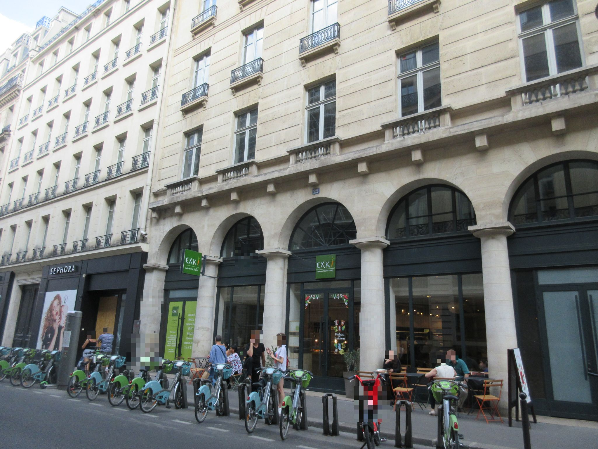 Emplacement panneau Histoire de Paris « Hôtel Moreau » situé 22 rue de la Chaussée-d'Antin